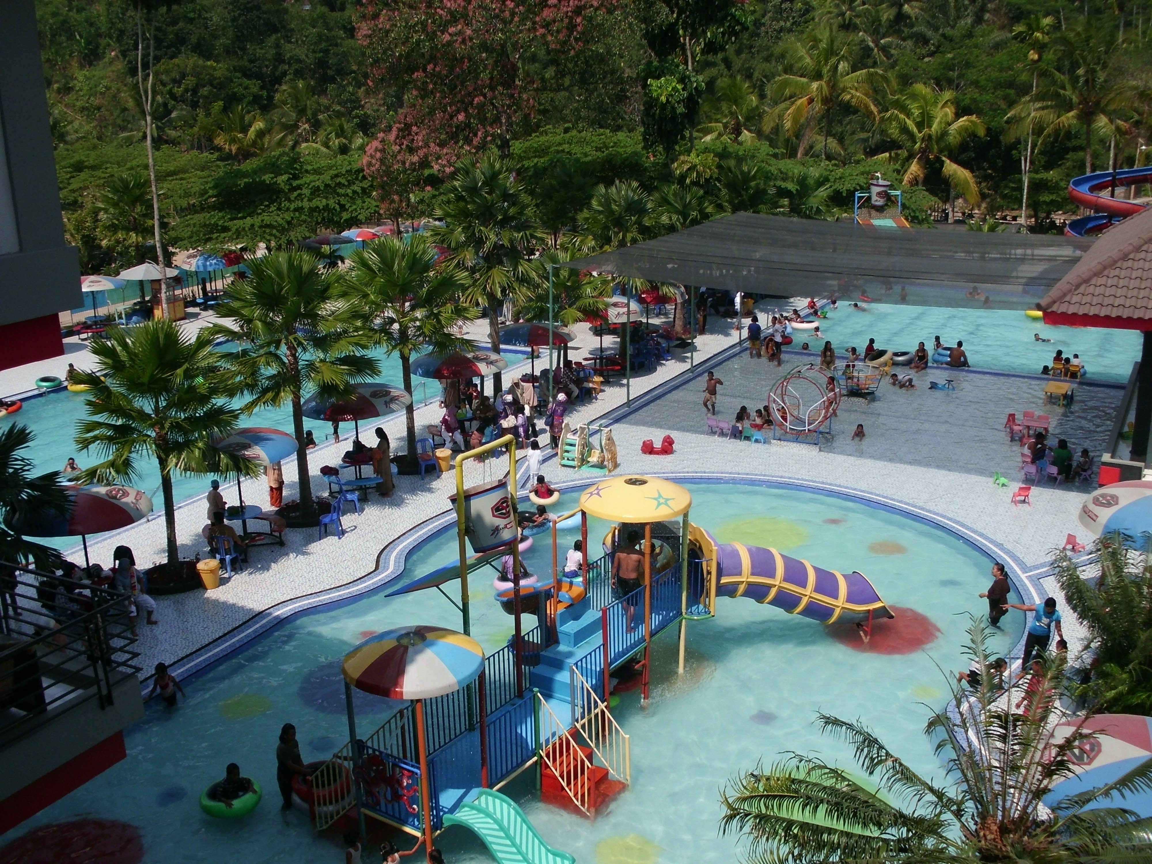 Water Park Surya Yudha